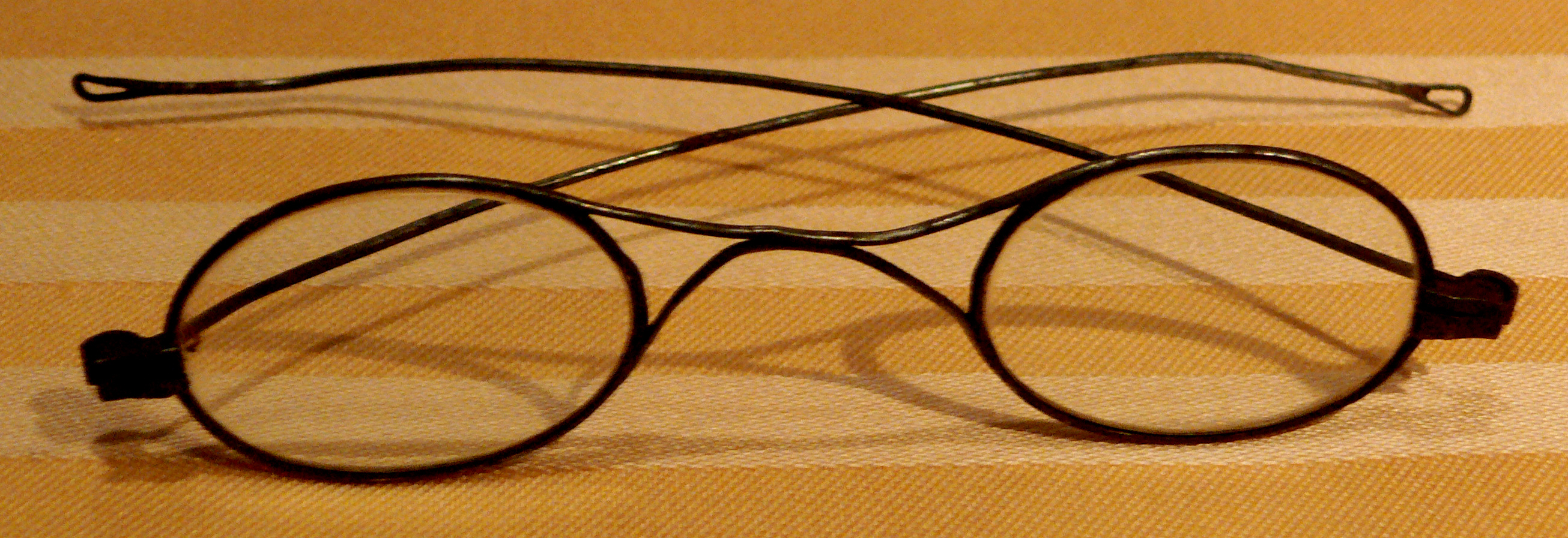 Haus der Musik, Wien Franz Schuberts Brille, Leihgabe des Jesuiten-Ordens Wien